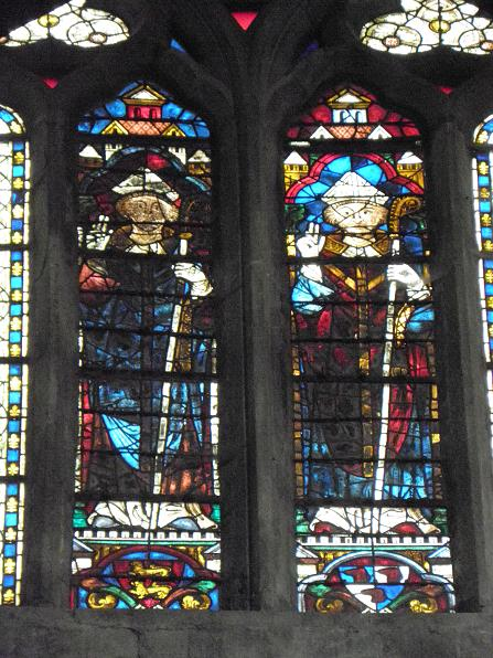 Verrière 212 de la cathédrale Saint-Samson de Dol.